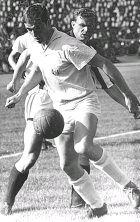 Title: SC Chemie Halle - SC Dynamo Berlin 2:1 Factual corrections and alternative descriptions are encouraged separately from the original description. Additionally errors can be reported at this page to inform the Bundesarchiv. Original historic description: Zentralbild-Schaar Ma-Qu 12.9.1965 Halle: Fußball-Oberliga - SC Dynamo Berlin unterlag 1:2 - Chemie-Spieler Heinz Steinborn hat den Ball sicher unter Kontrolle gebracht. Dahinter Martin Skaba. Rechts Jochen Carow (beide SC Dynamo). Der SC Chemie Halle schlug am 11.9.1965 in Halle den bisherigen Tabellenzweiten SC Dynamo Berlin mit 2:1 Toren.